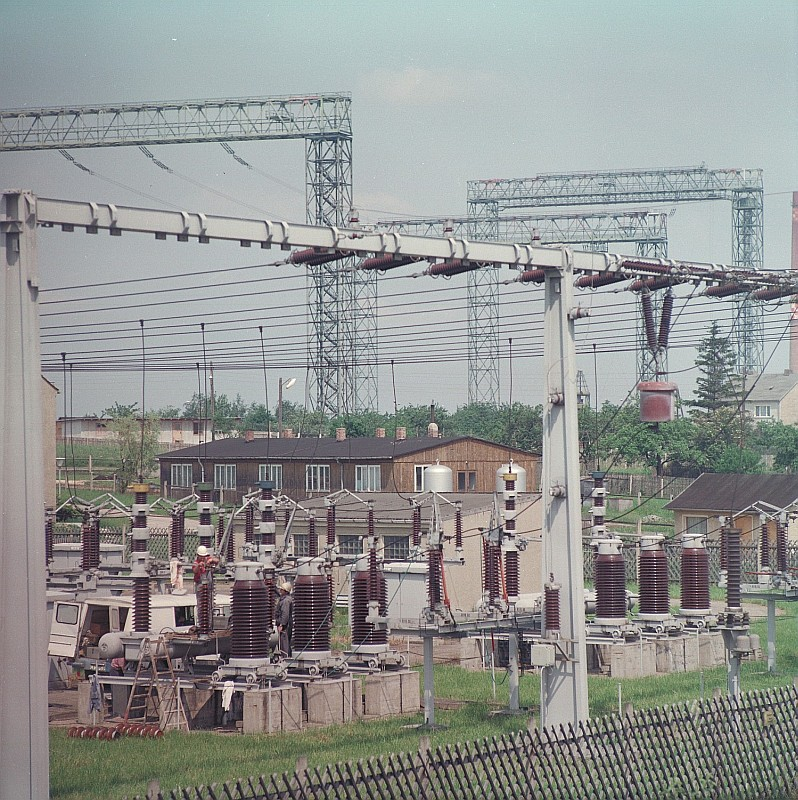 Original image description from the Deutsche Fotothek Versuchsanlage Hermsdorf